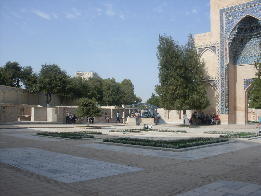 Mausoleum of Amir Temur (Gur-Emir mausoleum) мавзолей Амир Темур (мавзолей Гур-Эмир)